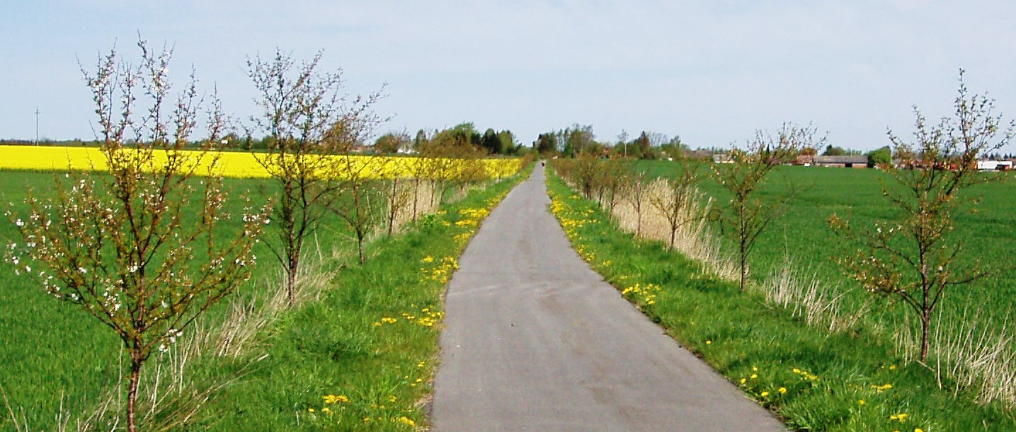 Kirsebæralle på banestien mellem Skelund og Veddum